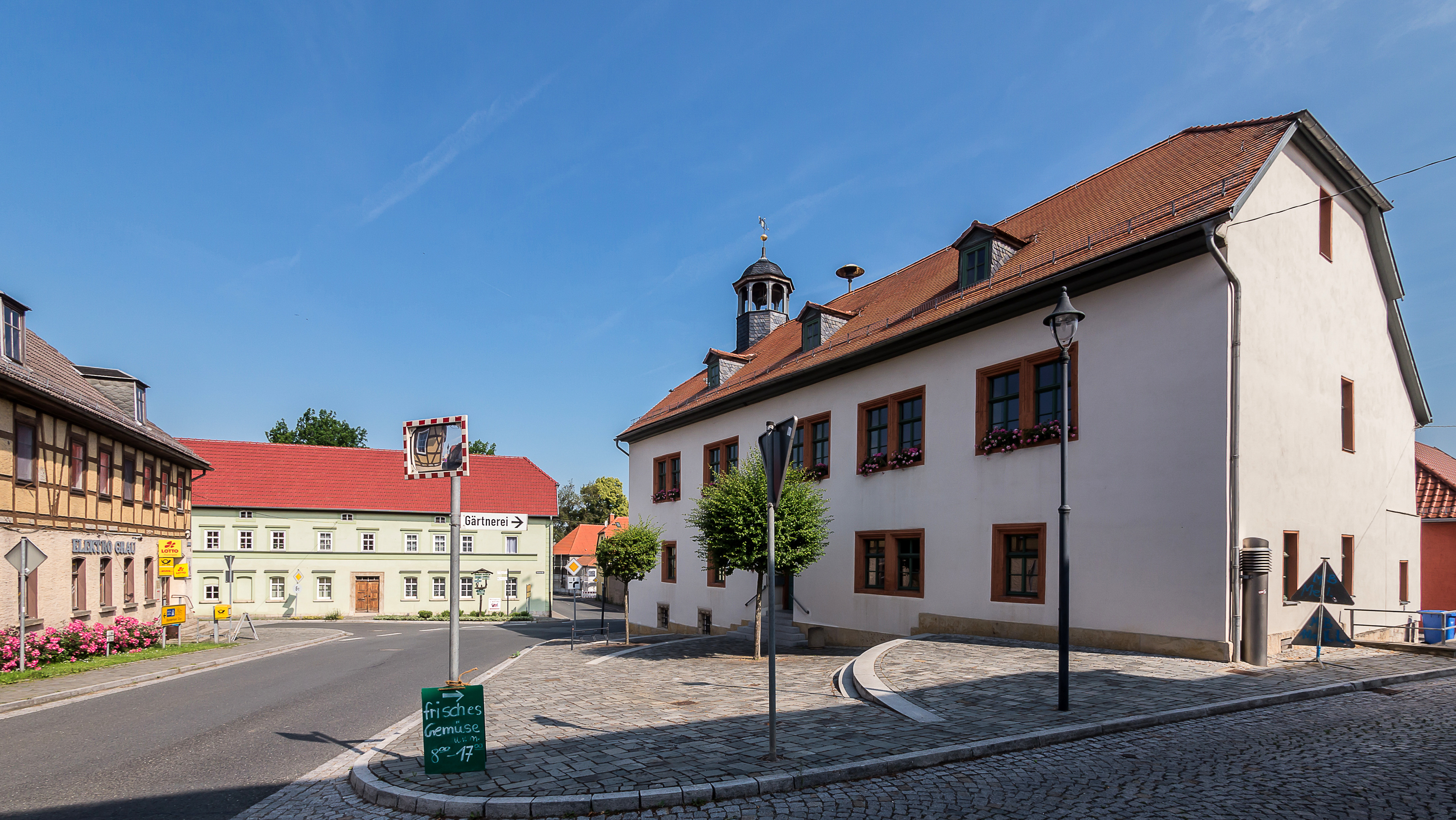 Magdala Markt Breitenstraße mit Am Markt 1–7 Breitenstraße 17 und 19